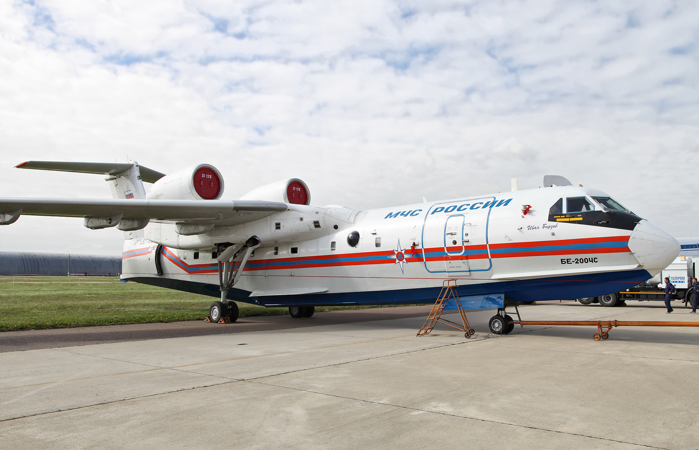 Бе-200ЧС (Be-200ChS)